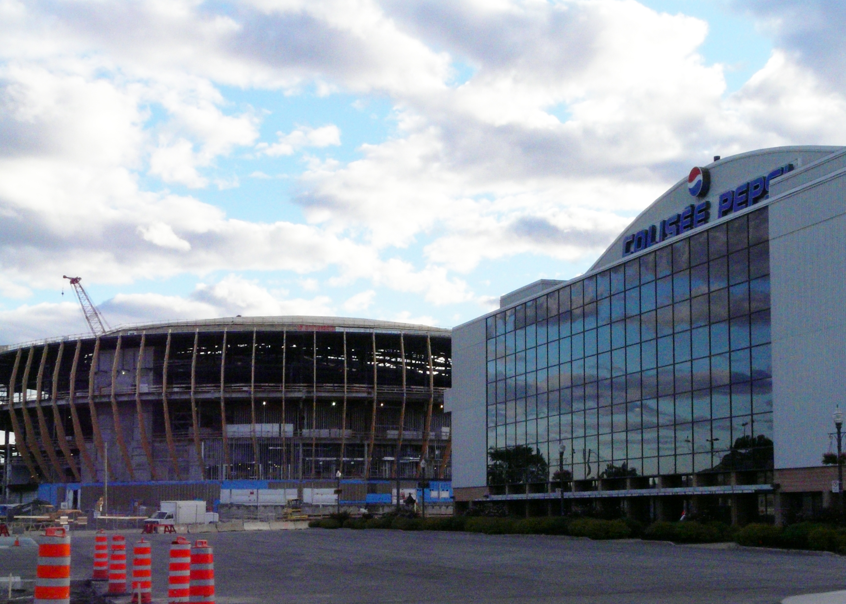 Le Colisée Pepsi et l'Amphithéâtre de Québec durant sa construction